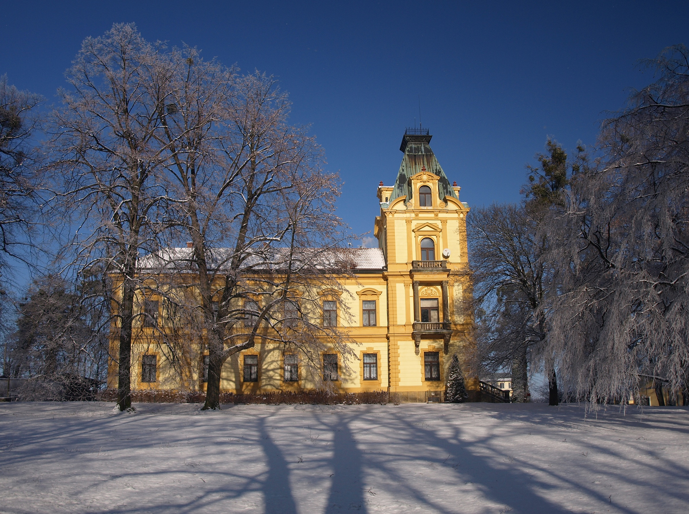 Zámek Pavlovice u Přerova, Pavlovice u Přerova 95